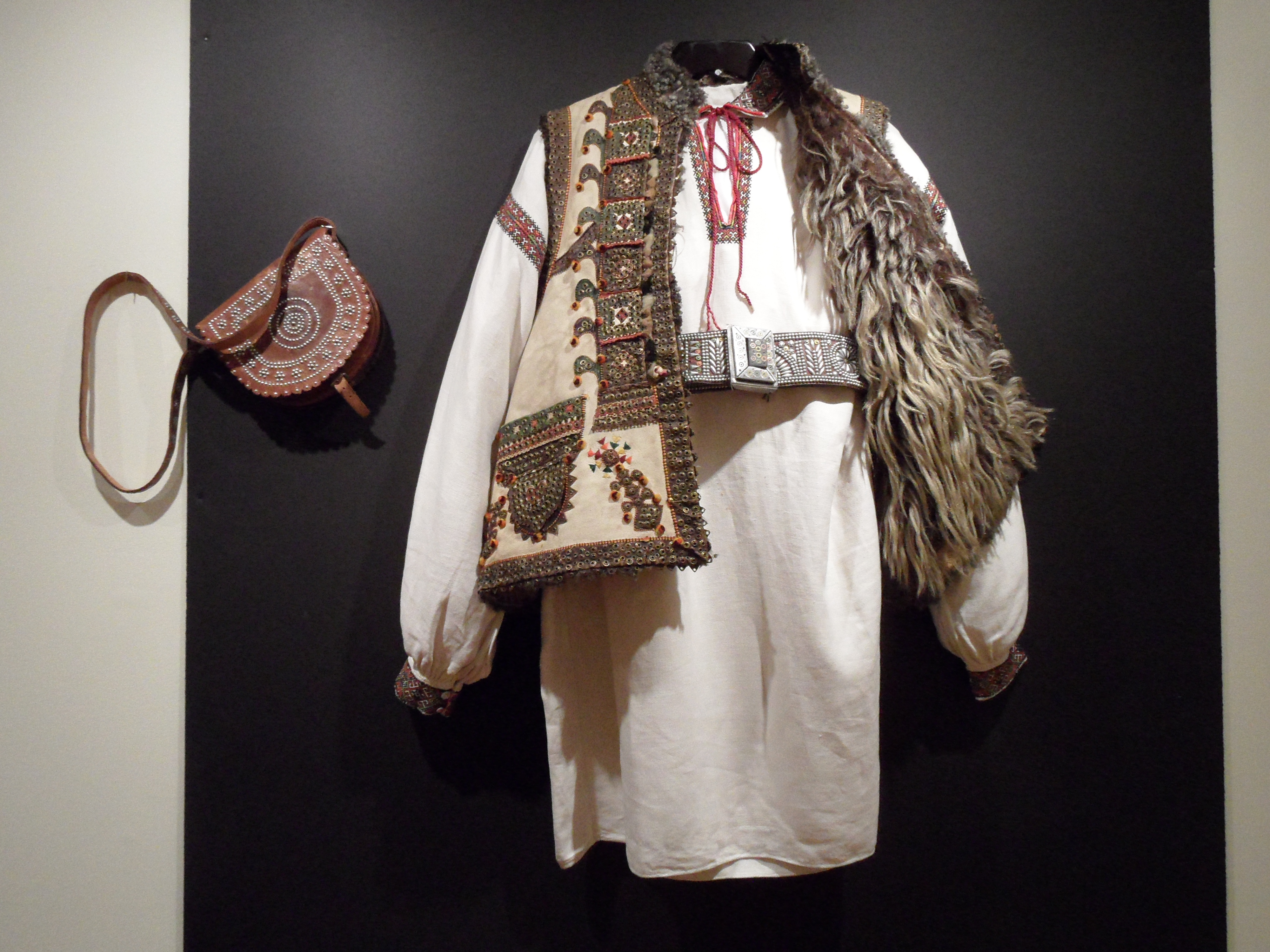 Ukrainian Cultural & Educational Centre. (Winnipeg, Manitoba)